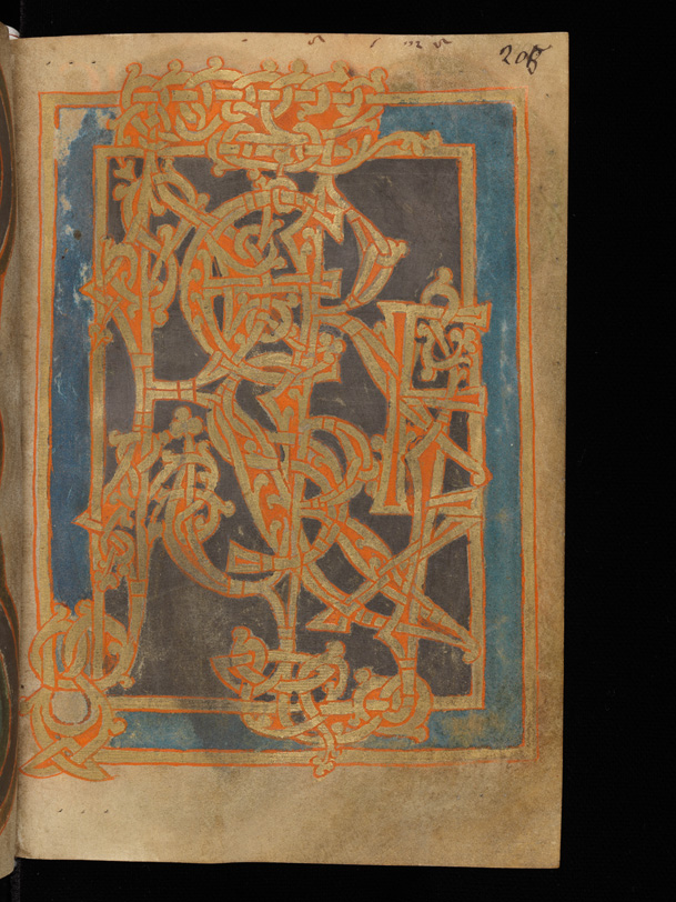 Cod. Eins. 121, "Resurrexi" als Monogramm, S. 205